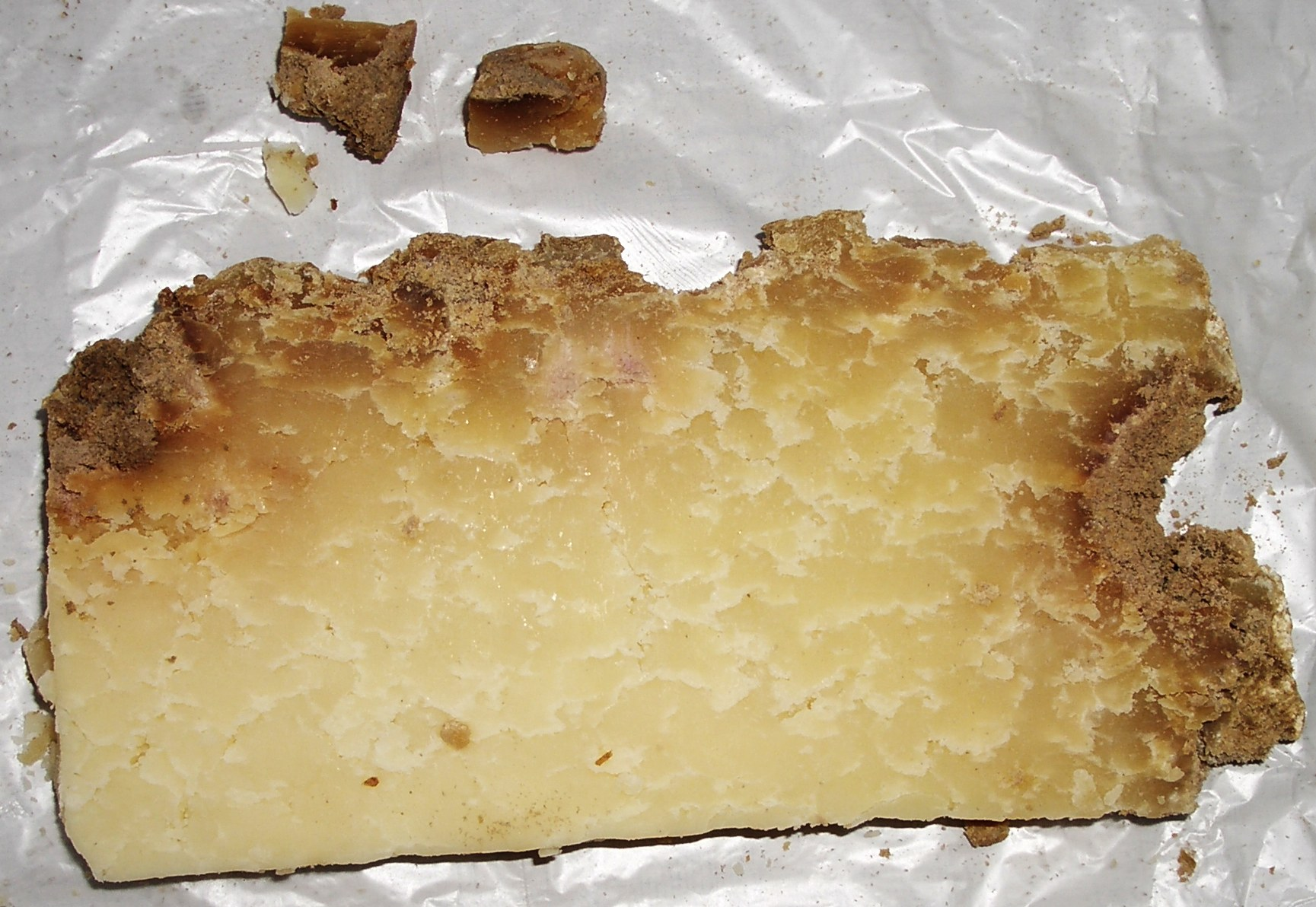 Une tranche de Cantal vieux